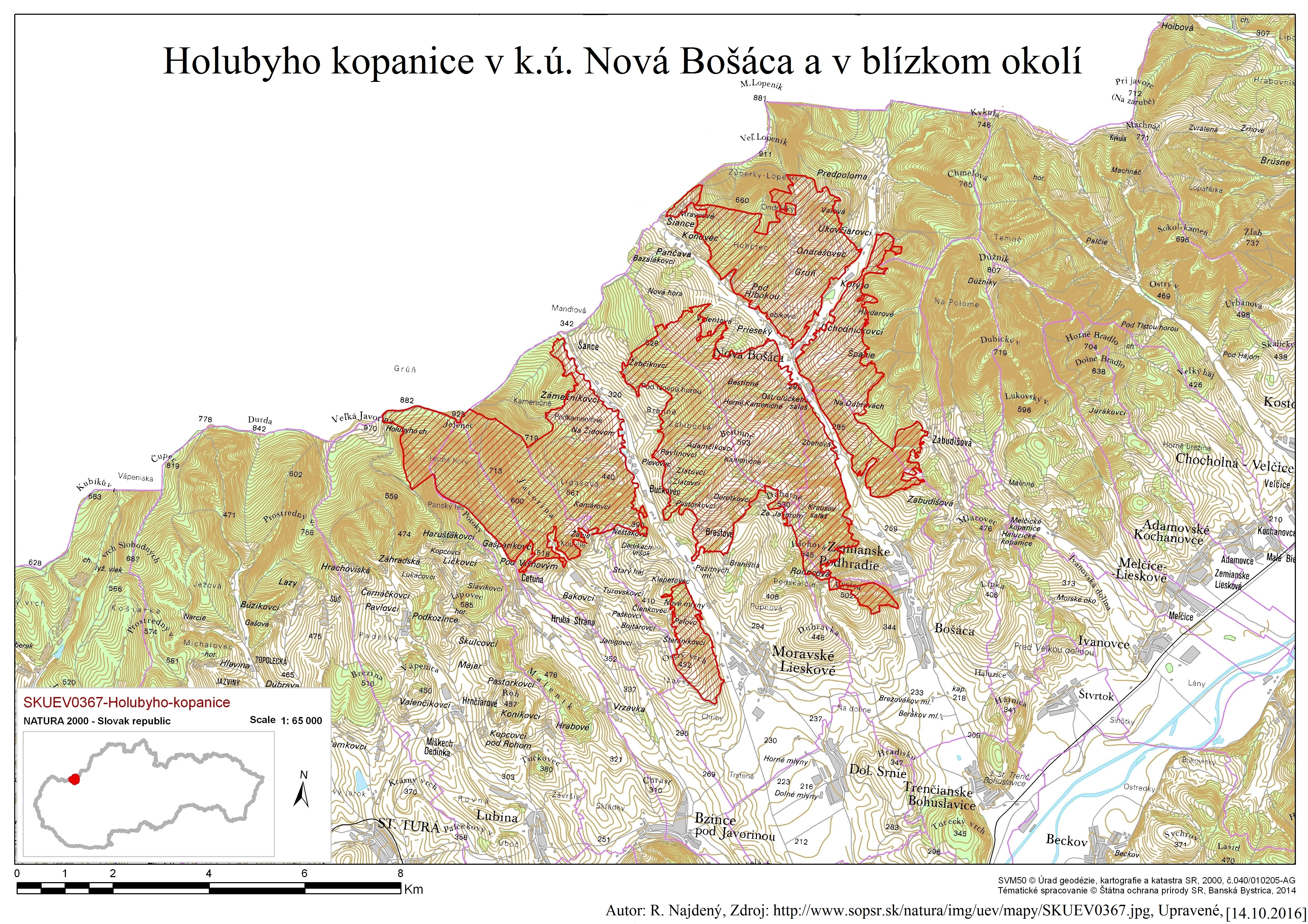 Holubyho kopanice